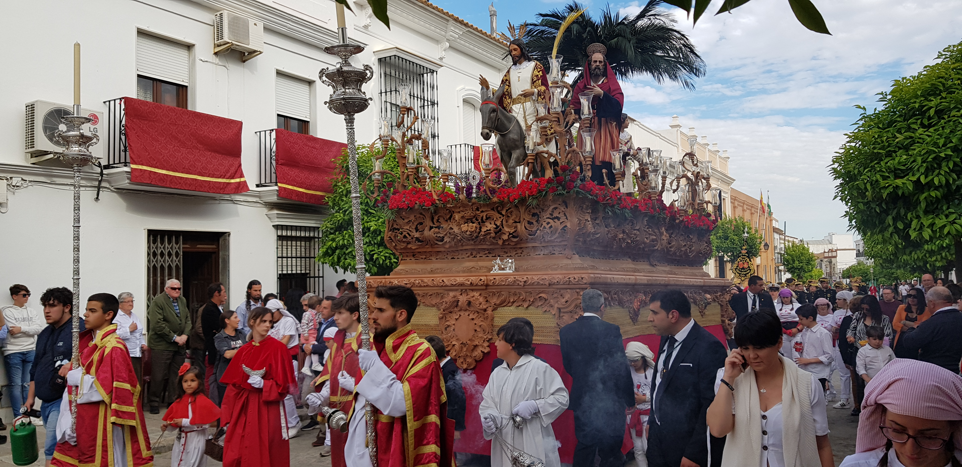 Hermandad de la Borriquita. Desfile procesional del Domingo de Ramos 2019. Vista del desfile por el casco urbano de Moguer.